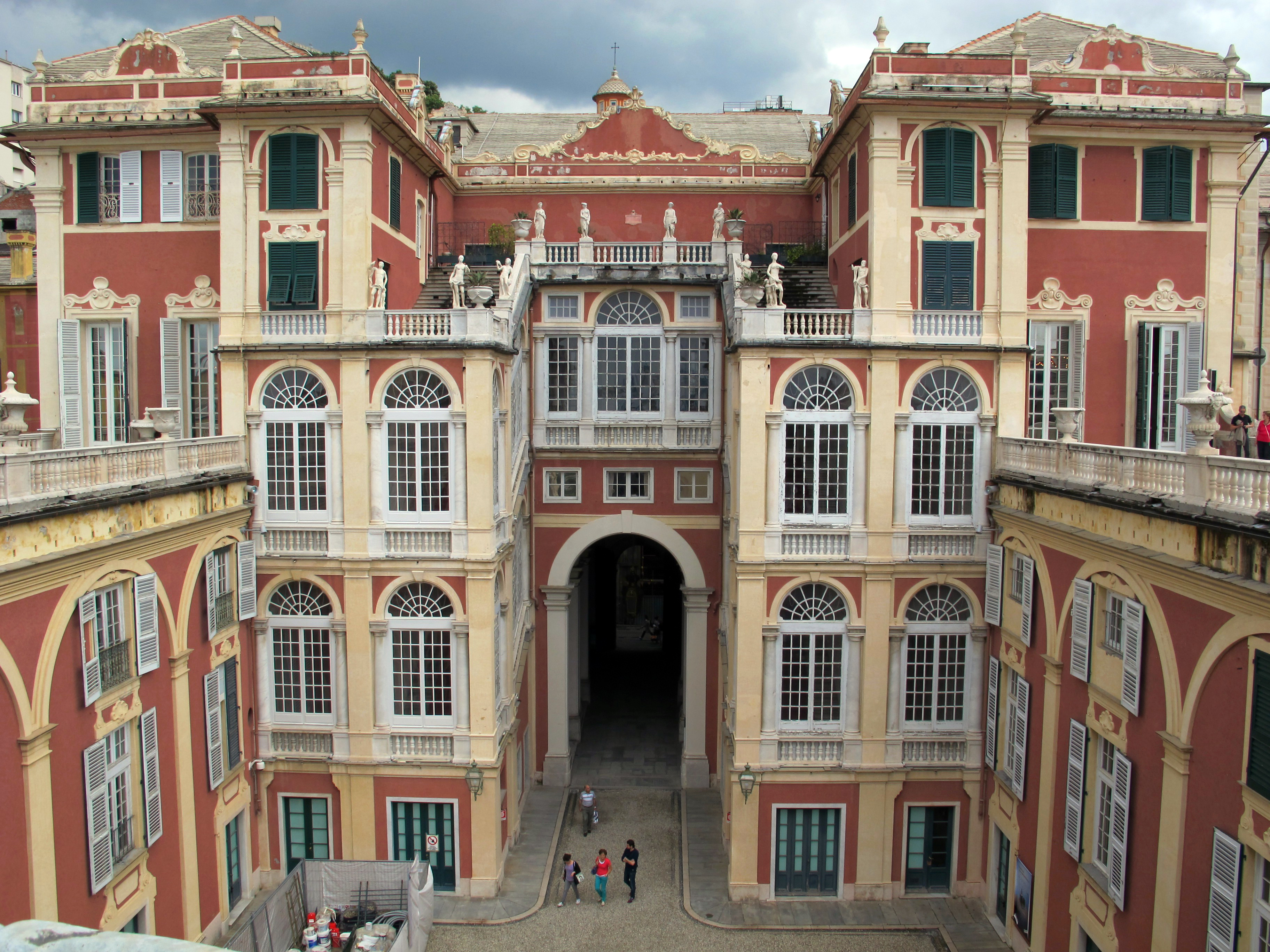 Palazzo Reale, Genova